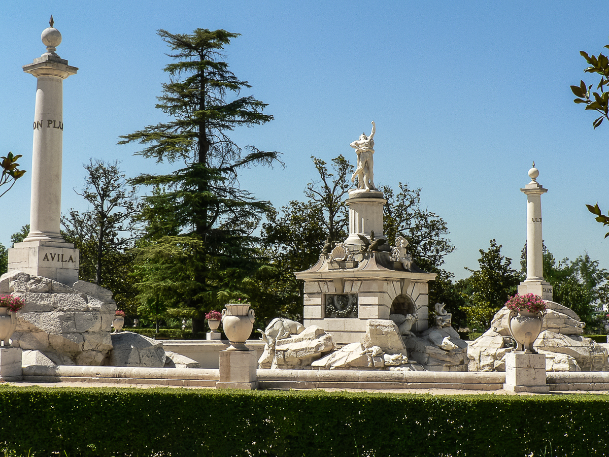 ARANJUEZ JARDINES DEL PRÍNCIPE 10072007 162420 00014.jpg